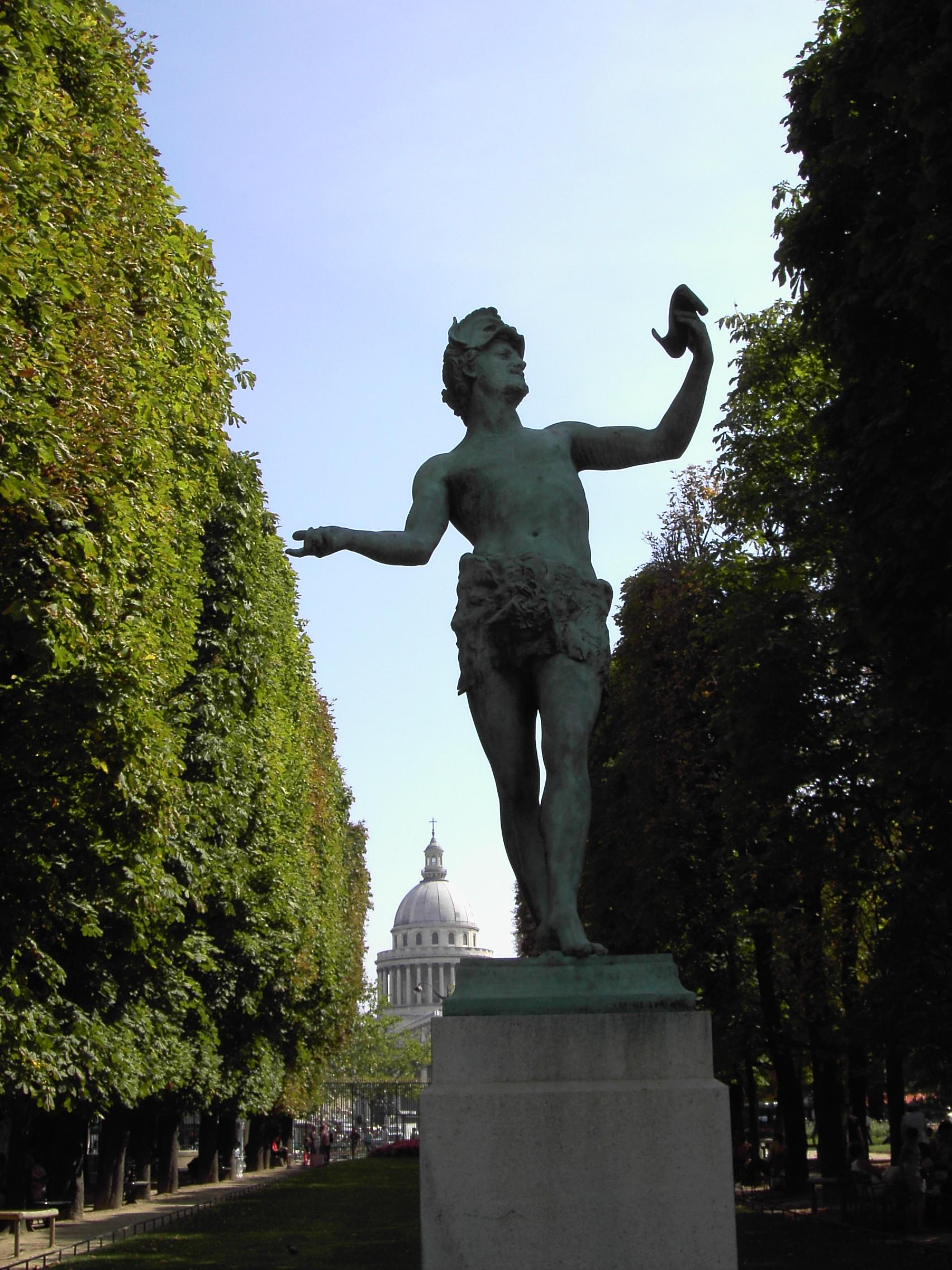 Charles-Arthur Bourgeois (Français, 1838-1886) [1]: Acteur grec (1868), bronze, Paris, Jardin du Luxembourg, et vue sur le Panthéon.